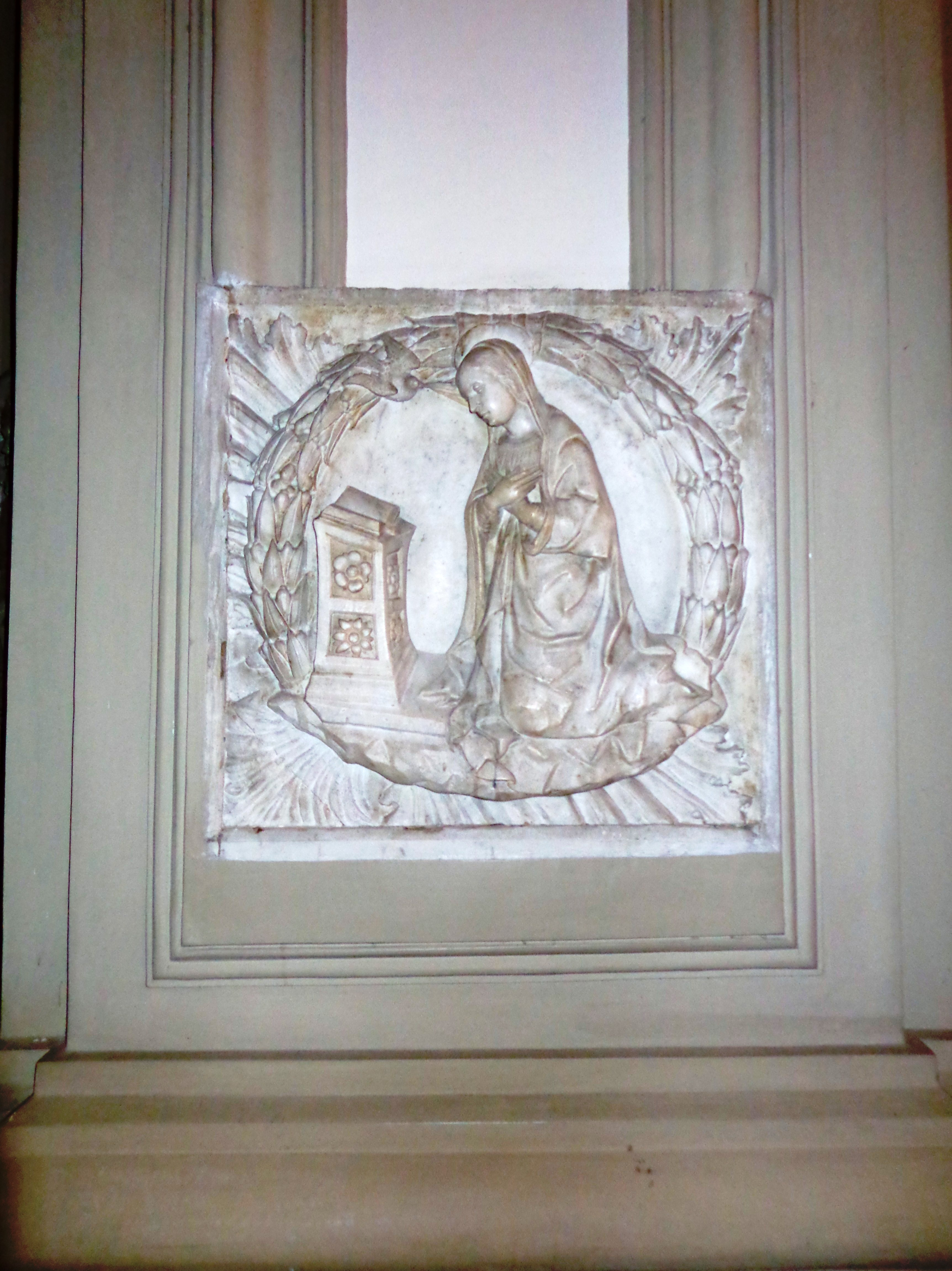 San Domenico PA 03